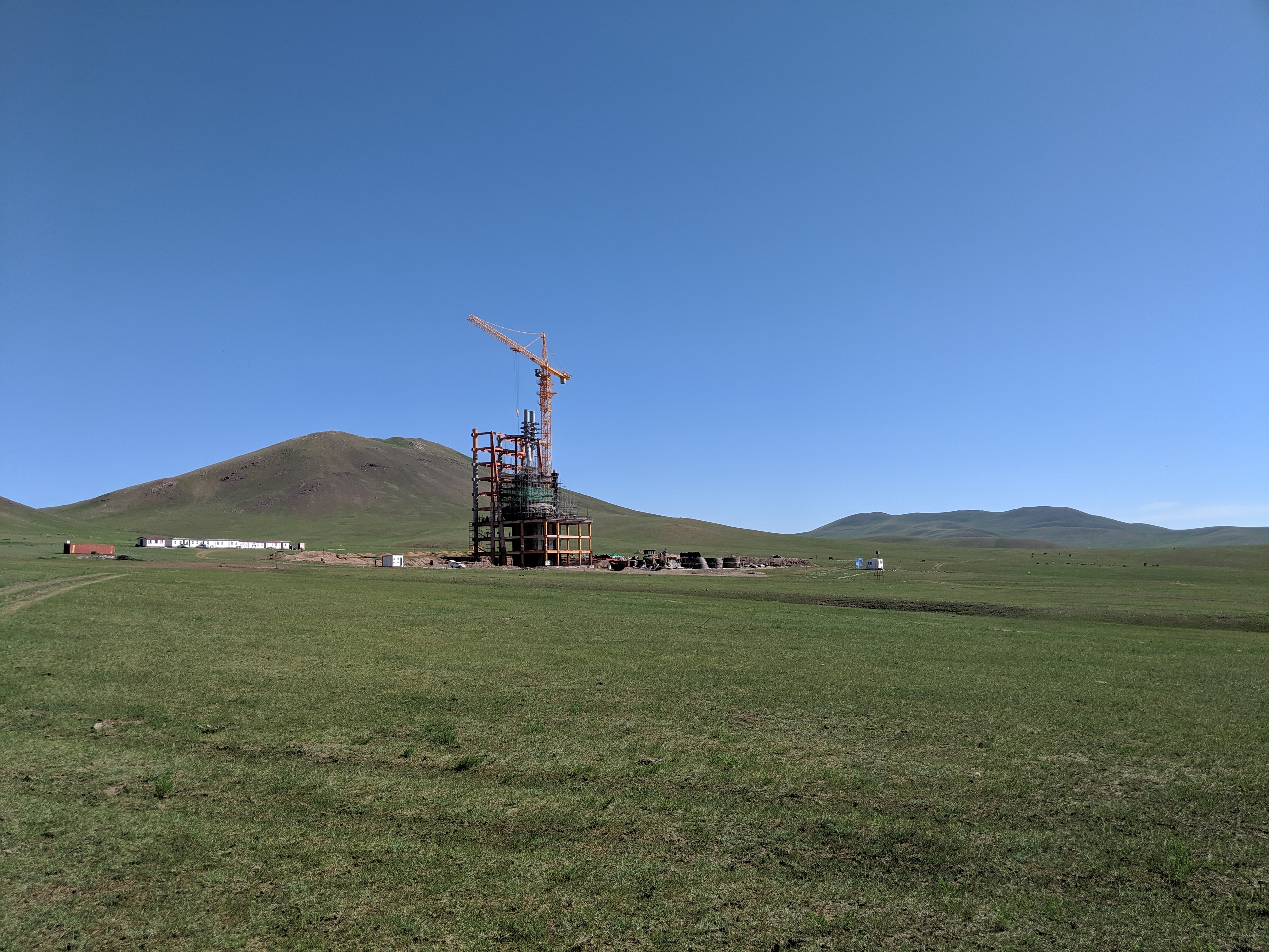 Baufortschritt Maidar City im Juni 2019